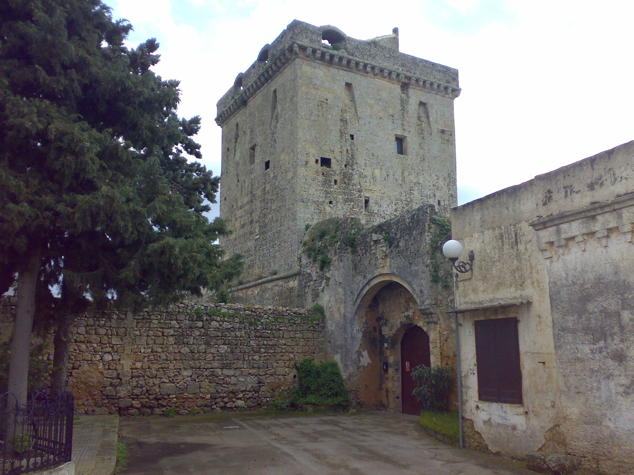 Barbarano del Capo Torre Capece